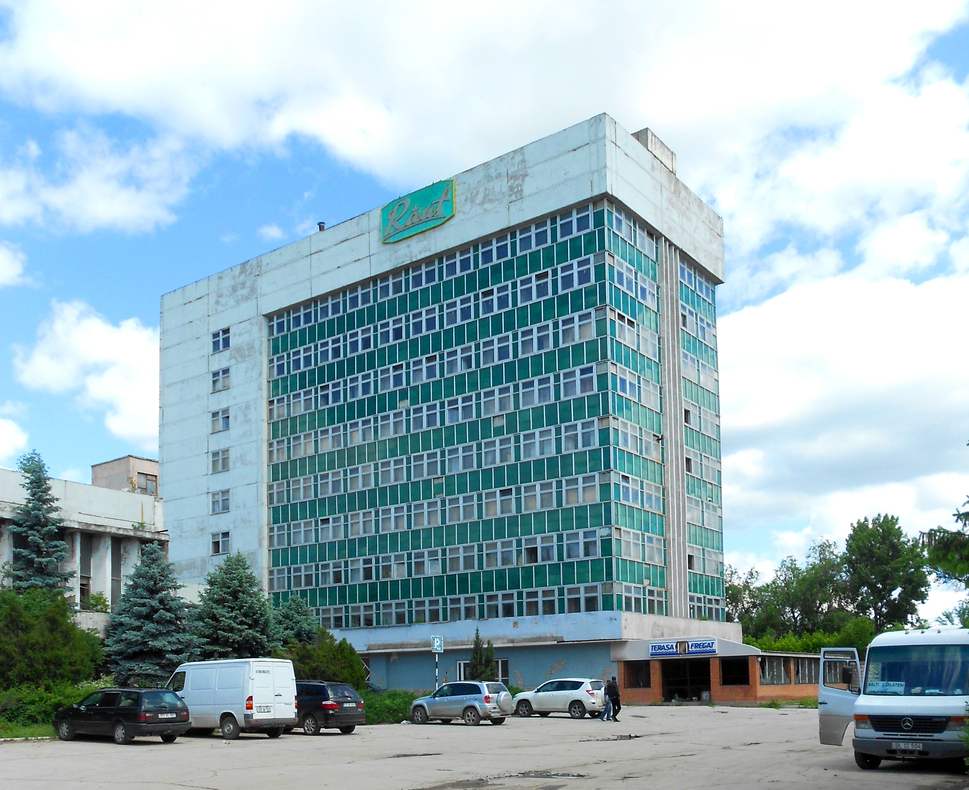 Uzina Răut, Bălți